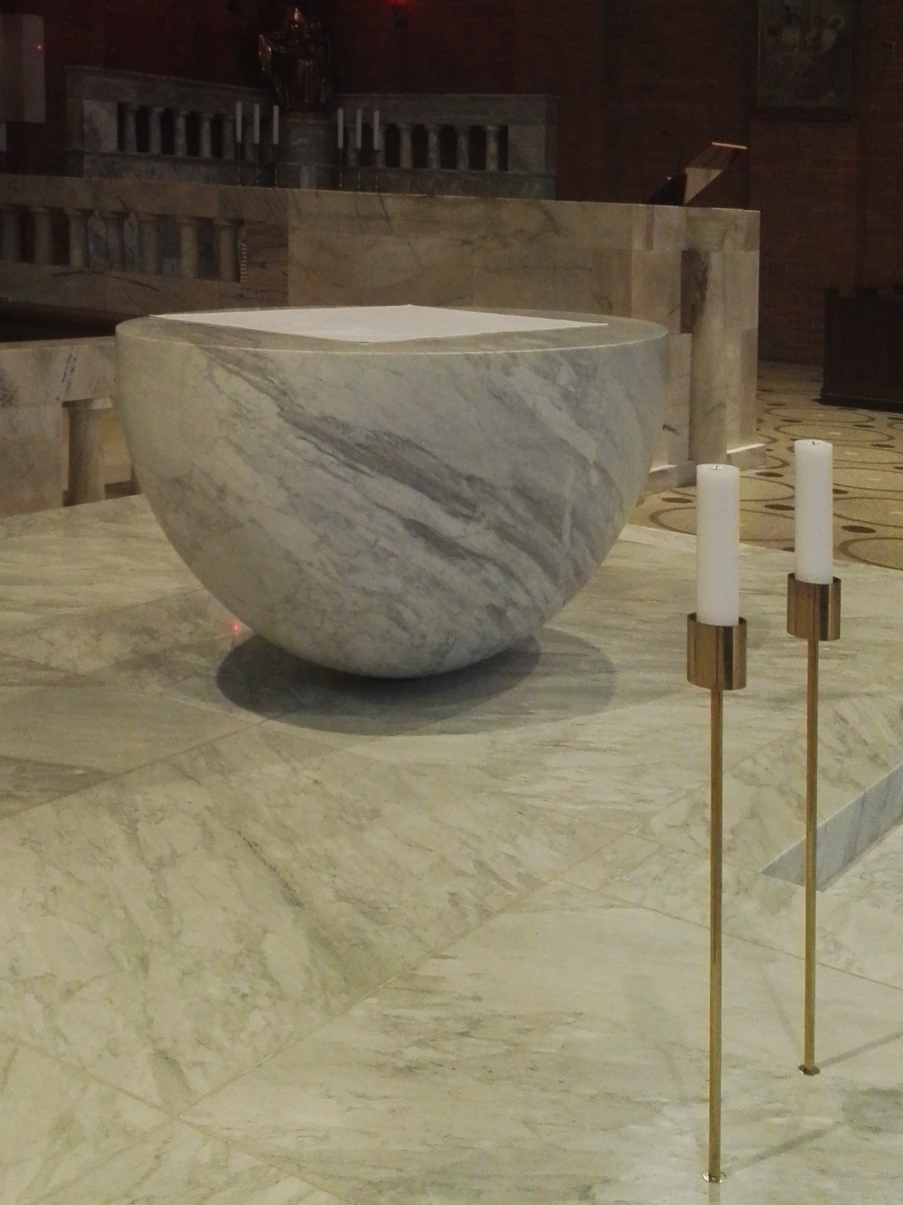 Oltář kostela Nejsvětějšího srdce Páně (Praha-Vinohrady) z roku 2018, z levé strany